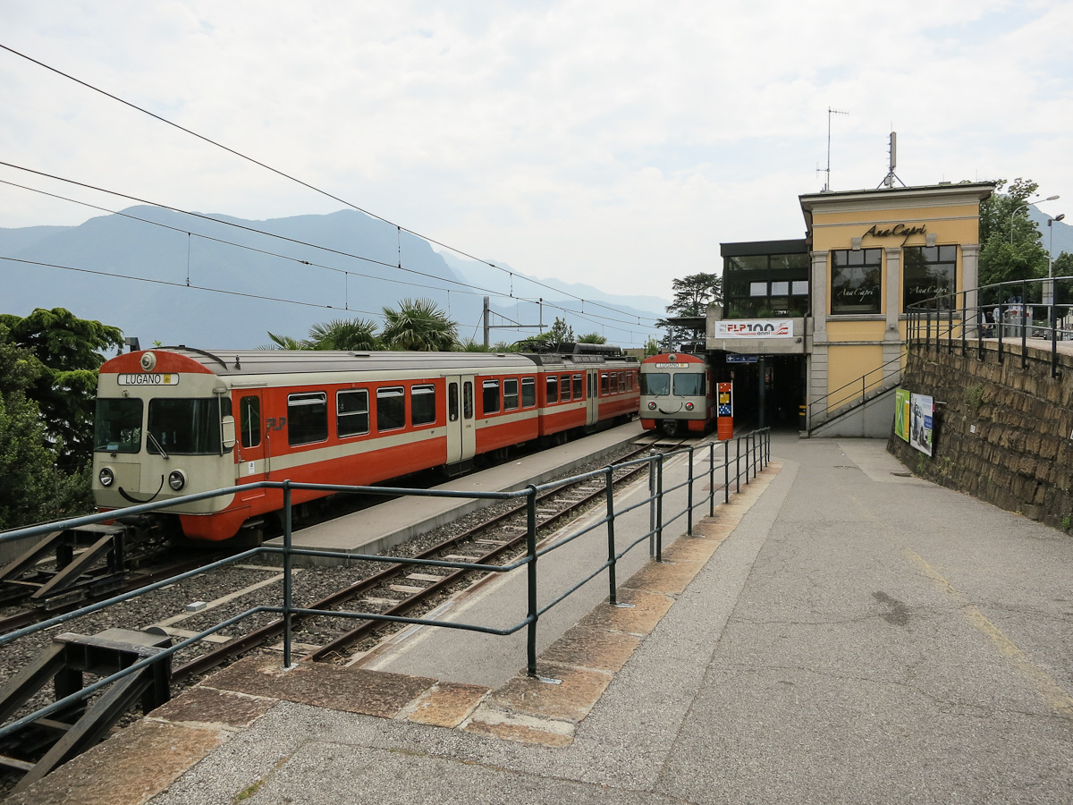 Bahnhof der FLP in Lugano (Schweiz)